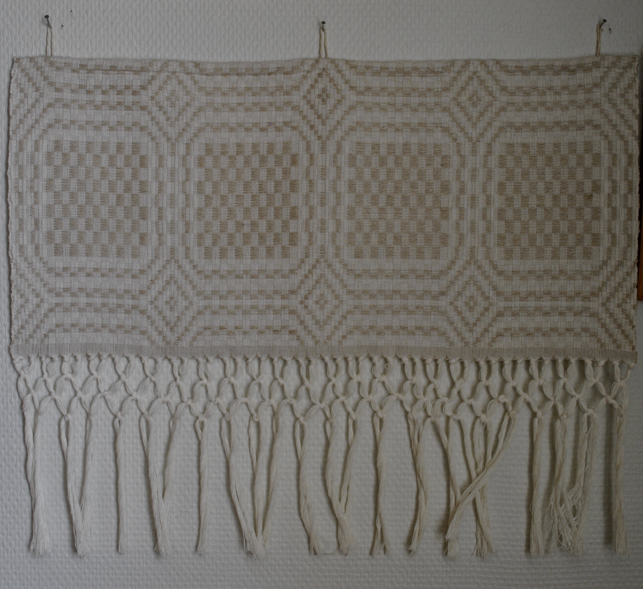 Varp: bomull. Inslag halvbläcka lin till tuskaft, oblekt eller färgat lin till mönster. Vävd i Nyeds hembygdsförenings vävstuga Dahlgrensgården. Molkom, juli 2107.